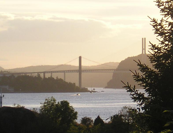 The bridge "Breviksbrua", Porsgrunn, Telemark, Norway.